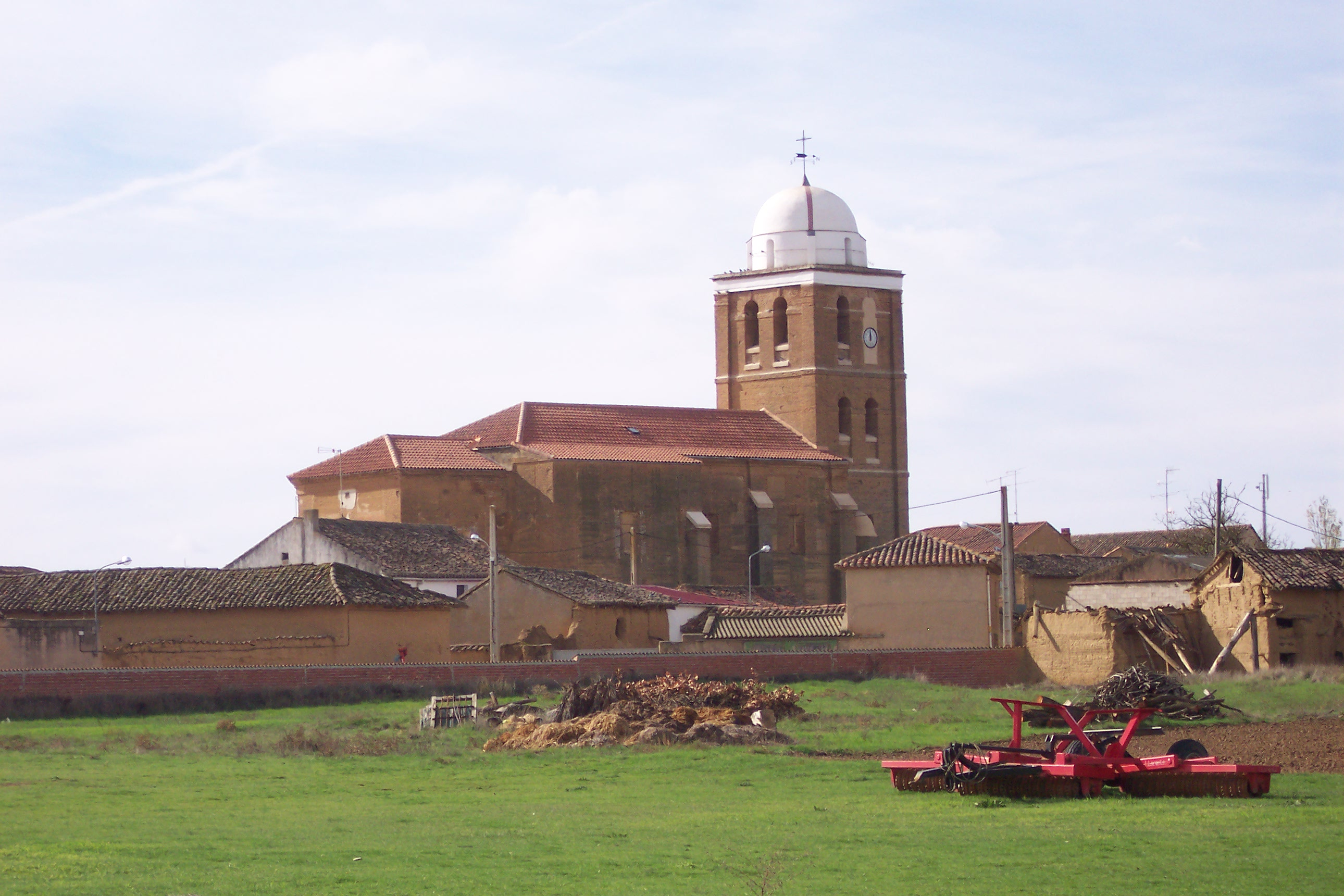 Vista en detalle de la localidad de San Román de la Cuba (Palencia, España).